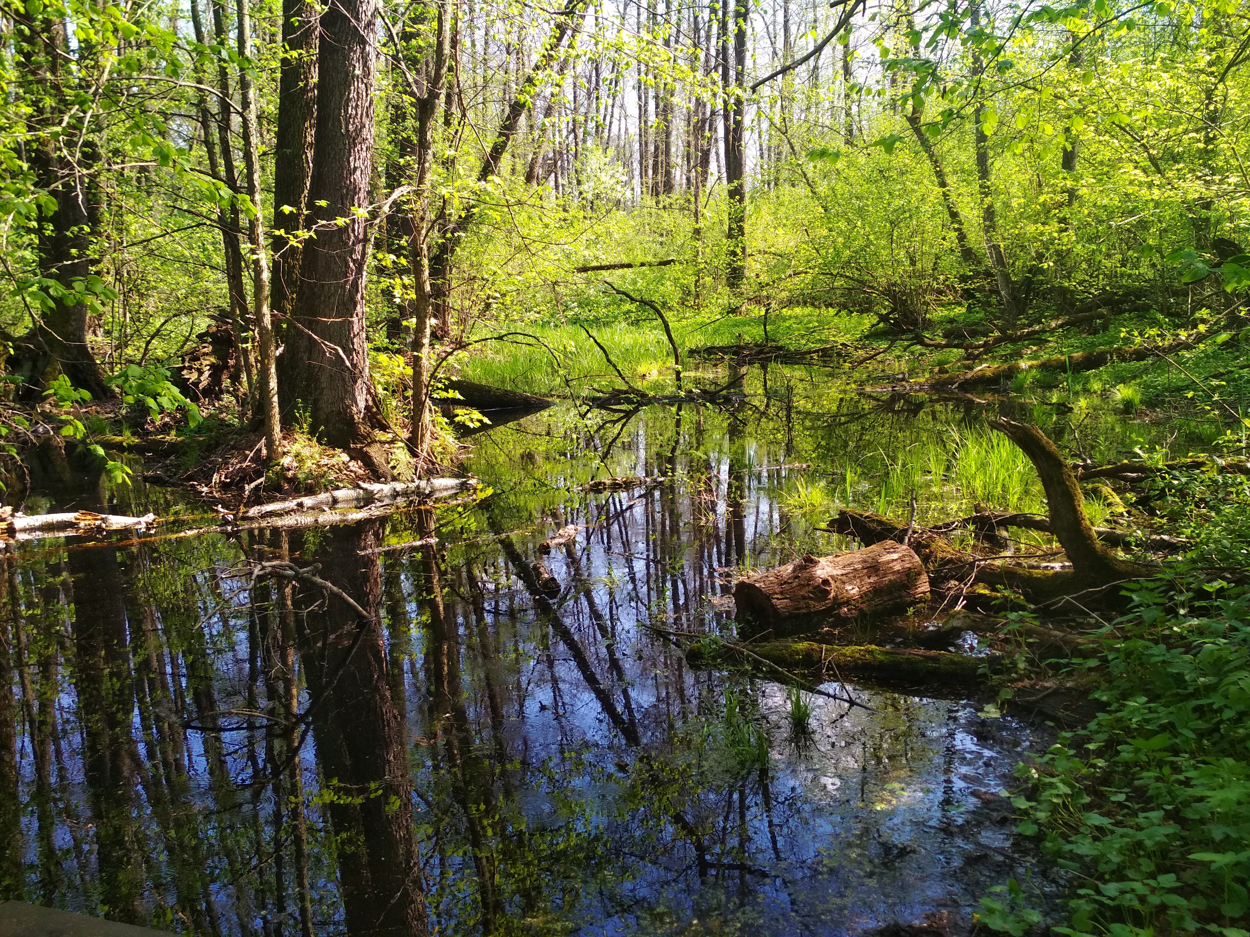 Воронежский заповедник: Территория заповедника расположена на границе Воронежской (Верхнехавский р-н) и Липецкой (Усманский р-н) областей и занимает северную половину островного лесного массива – Усманского бора., Верхнехавский район, Воронежская область This image is related to the protected area of Russia number 3600069